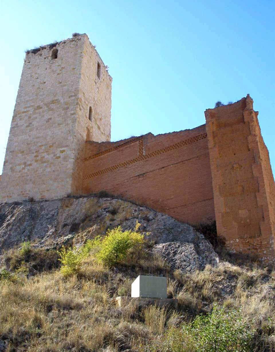 Recinto amurallado de Daroca (Zaragoza). Torre de las Cinco Esquinas